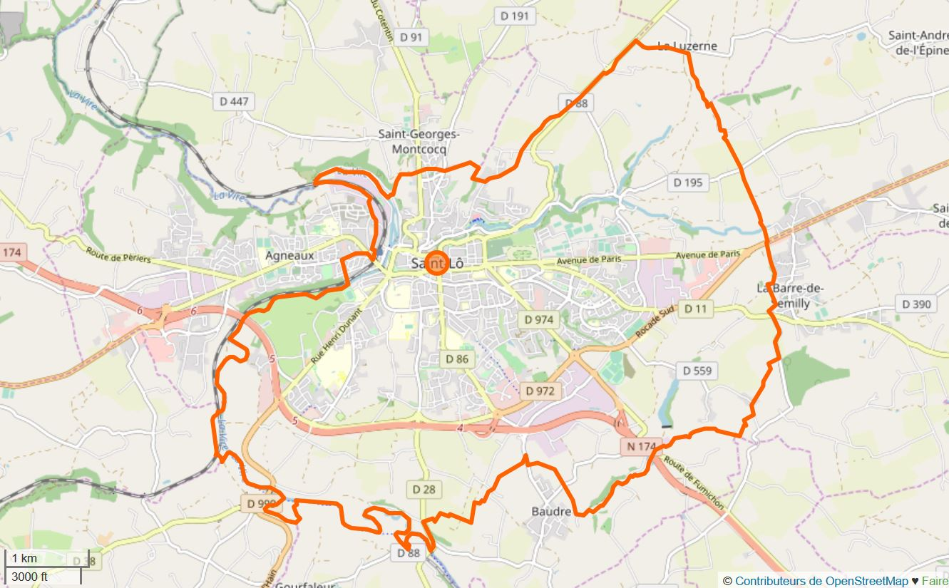 Cette carte a été créée à partir des données du projet Openstreetmap. This map may be incomplete, and may contain errors. Don't rely solely on it for navigation.